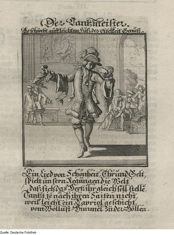 Original image description from the Deutsche Fotothek Ständebuch & Beruf & Meister & Tanz